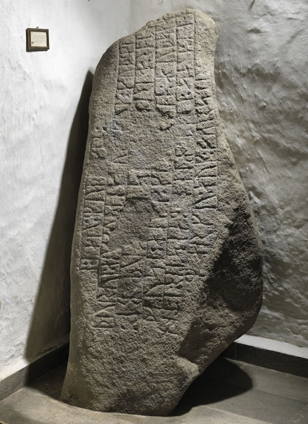 Foto: Nationalmuseet ved Roberto Fortuna